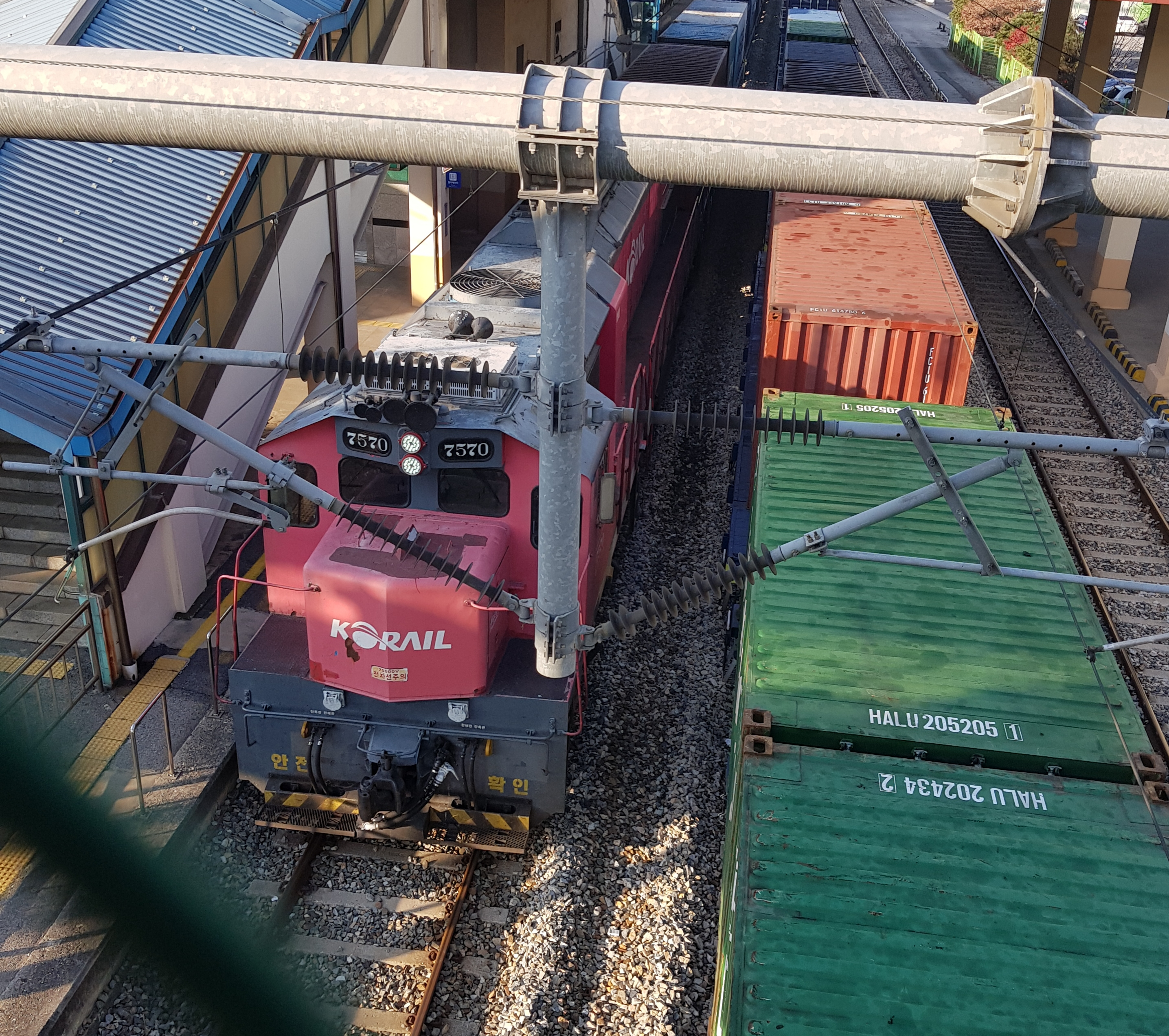 신탄진역을 지나고 있는 7570호 기관차.